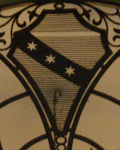 Palazzo taddei stemma ginori cancellata2